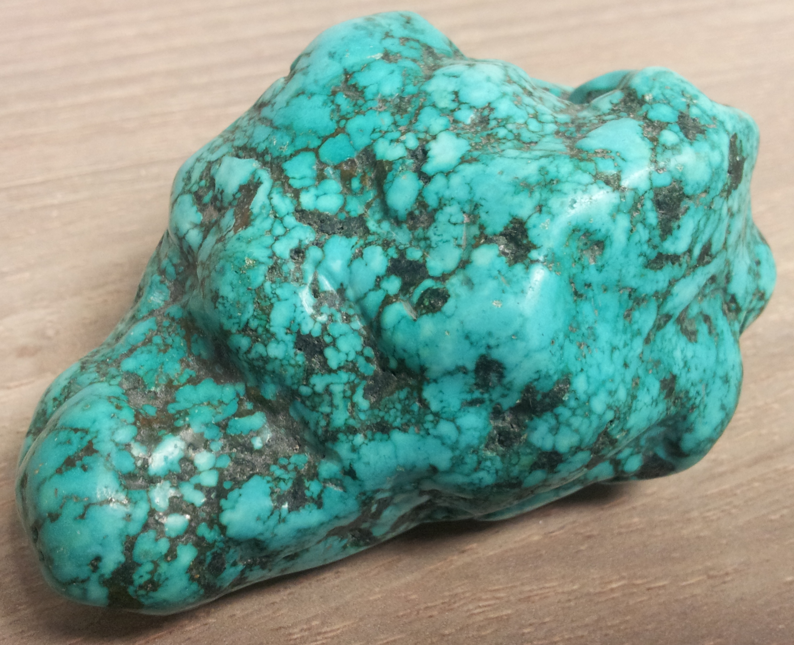 טורקיז